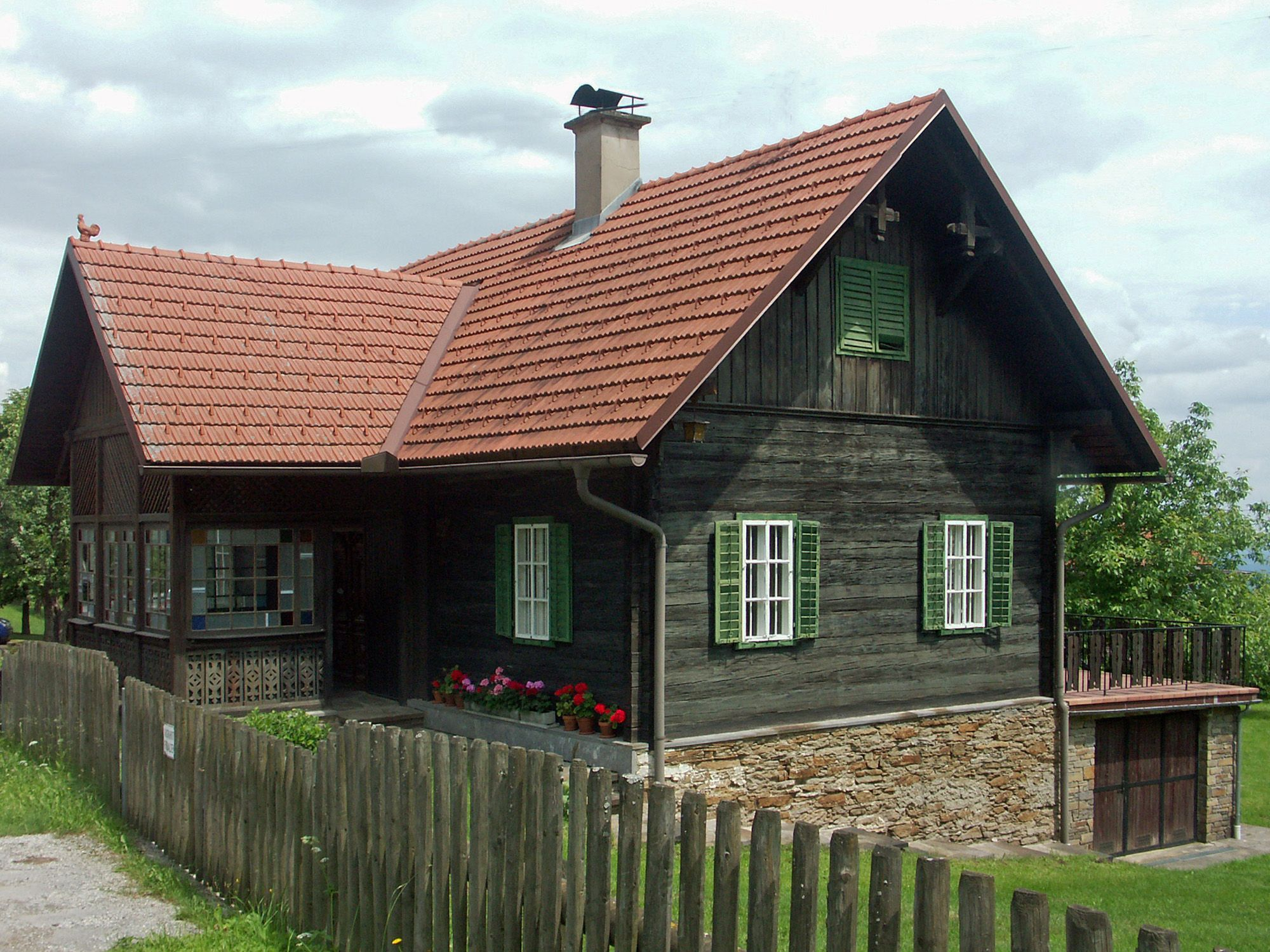 Höllerhansl-Haus in Rachling